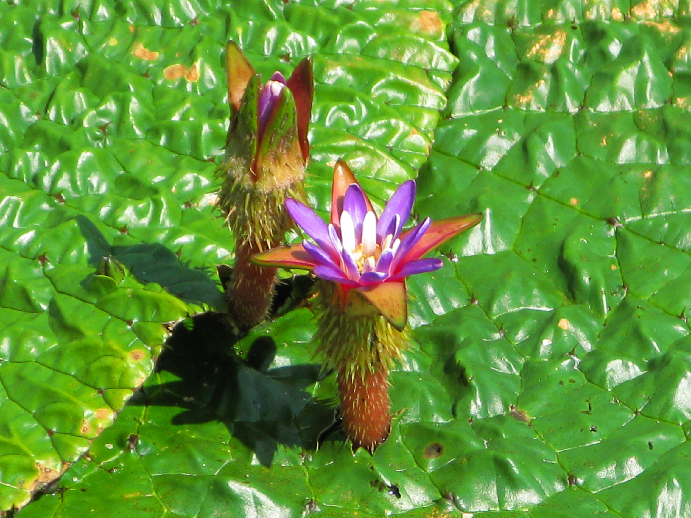 オニバスの開放花（埼玉県行田市「古代蓮の里」にて）